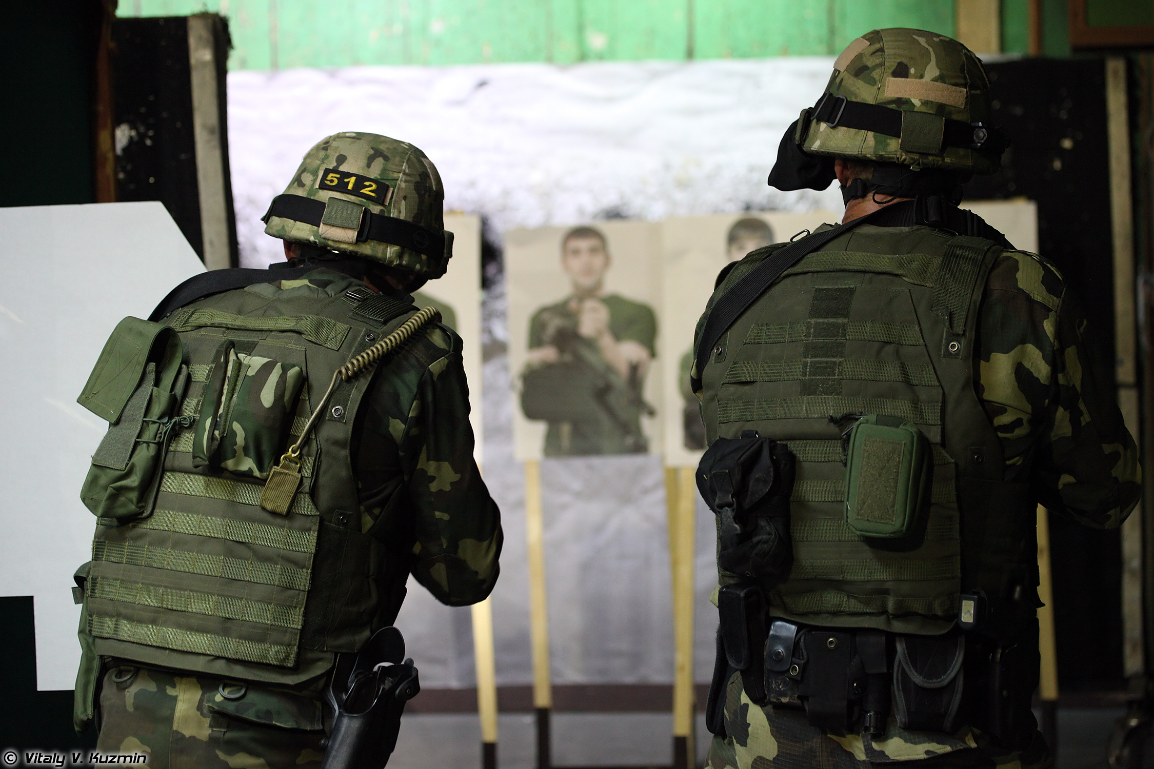 СОБР ВВ МВД Республики Беларусь